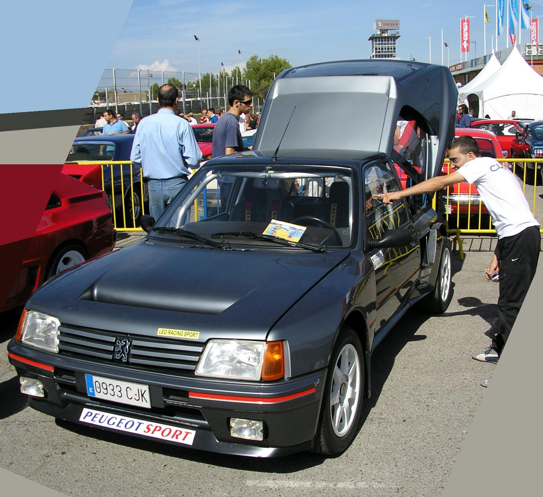 Peugeot 205 t16 engine shown in Circuito del Jarama (Madrid). Jornada de puertas abiertas 2006.